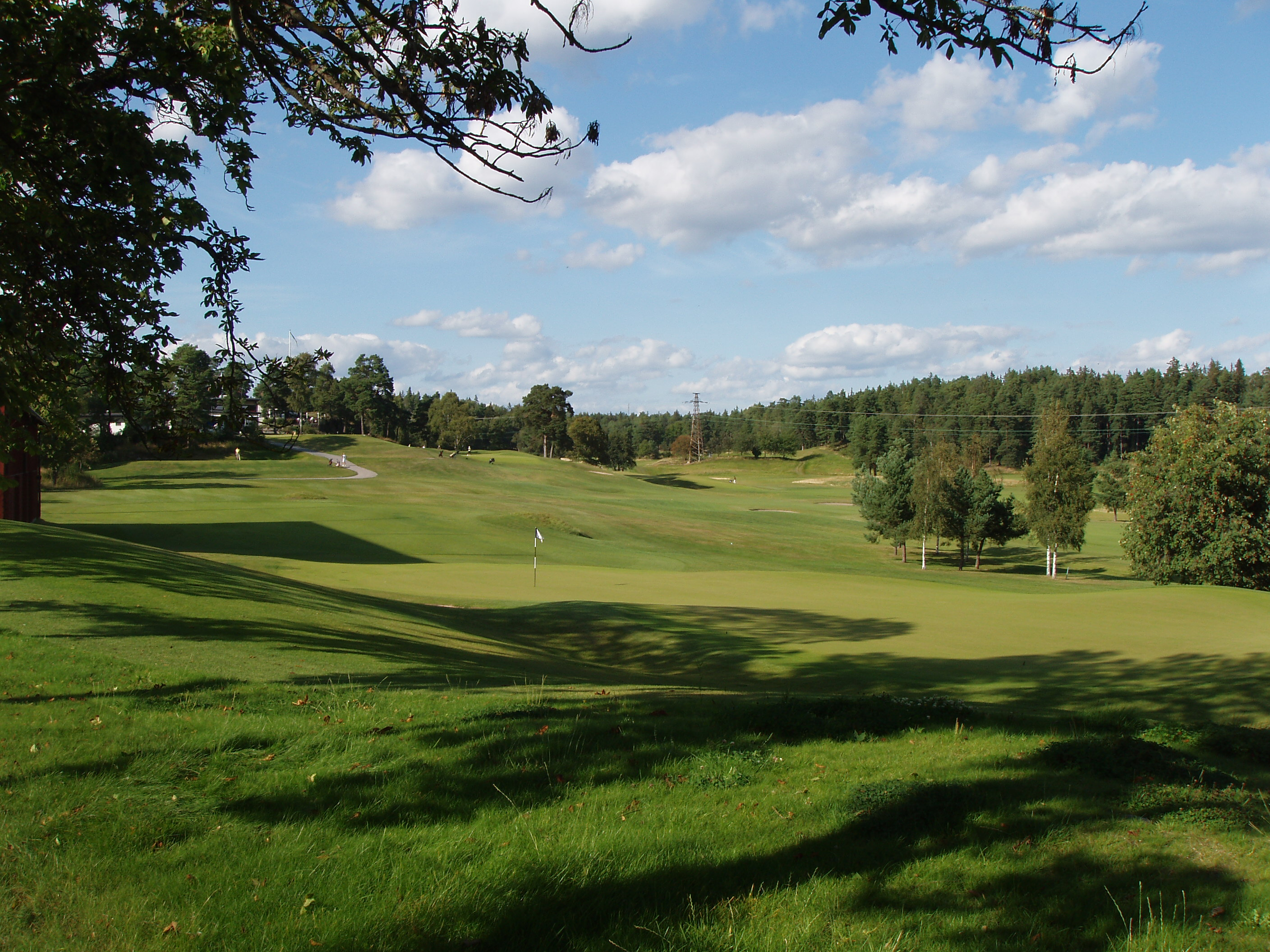 Lidingö golfklubb. Banan. Vy mot nordost med hål nr. 1 i förgrunden och klubbhuset uppe till vänster.